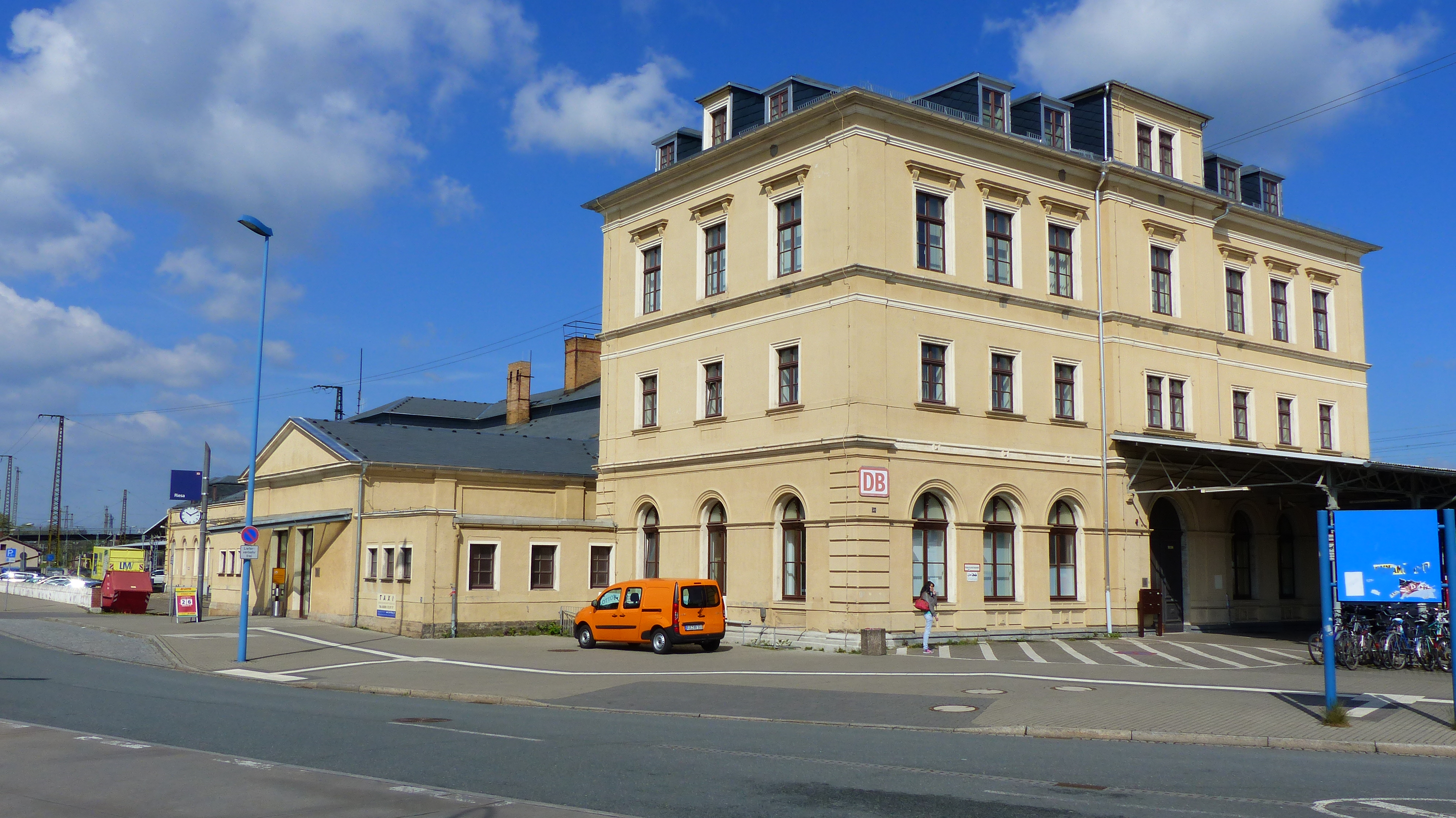 Bahnhof Riesa, Bahnhofstraße 50, Riesa